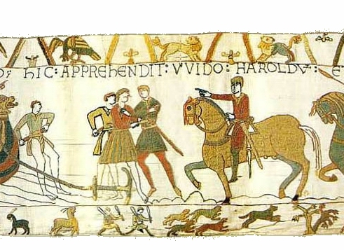 Szene 6: Die Engländer gehen an Land